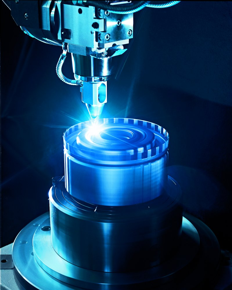 Laserschweißen